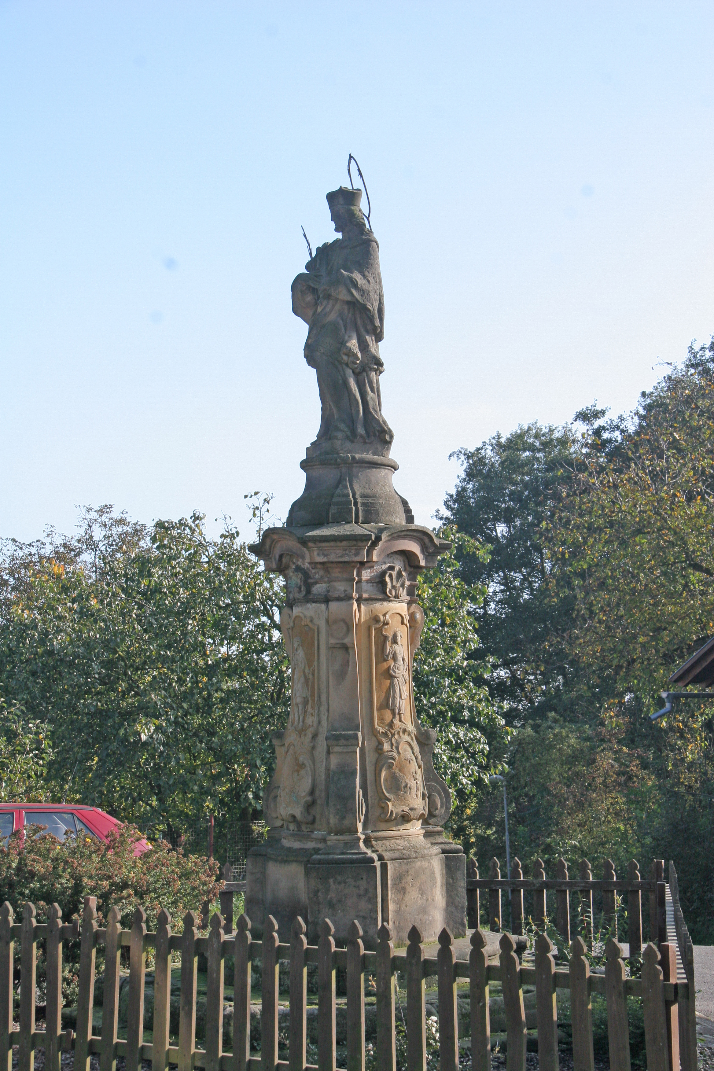 Socha svatého Jana Nepomuckého, Bukvice (okres Jičín).